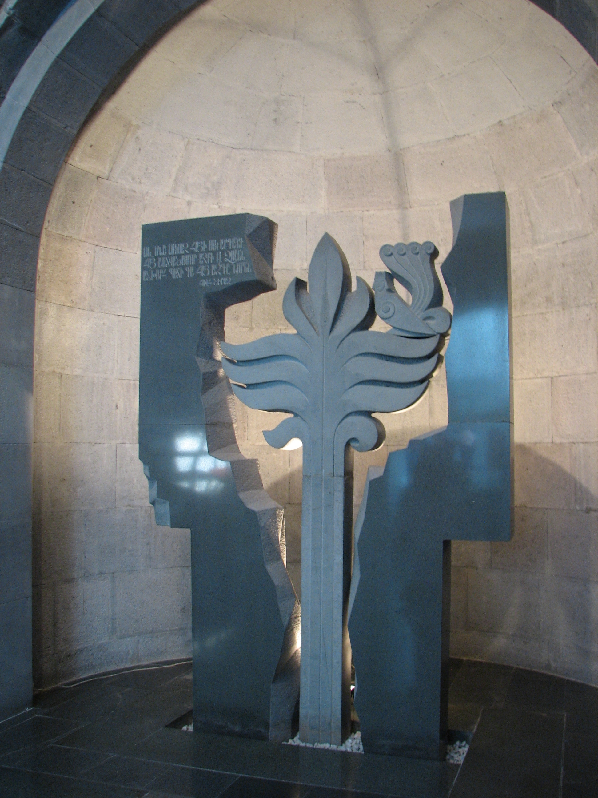 Armenian Genocide Museum-Institute in Yerevan, Armenia המוזיאון לרצח העם הארמני בירוואן בירת ארמניה מצבה בתוך המוזיאון